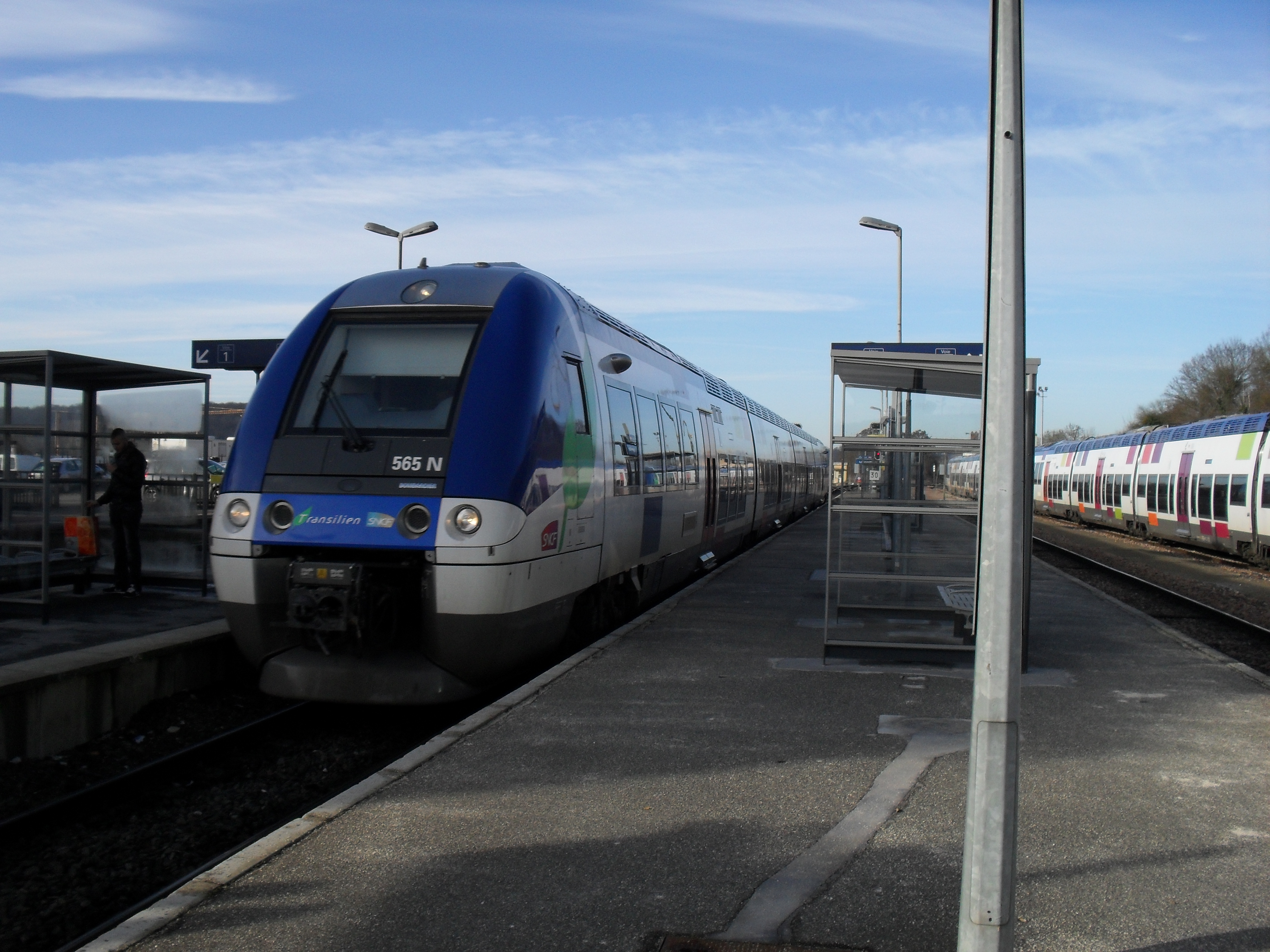 B 82500 en gare de Longueville, Seine-et-Marne.